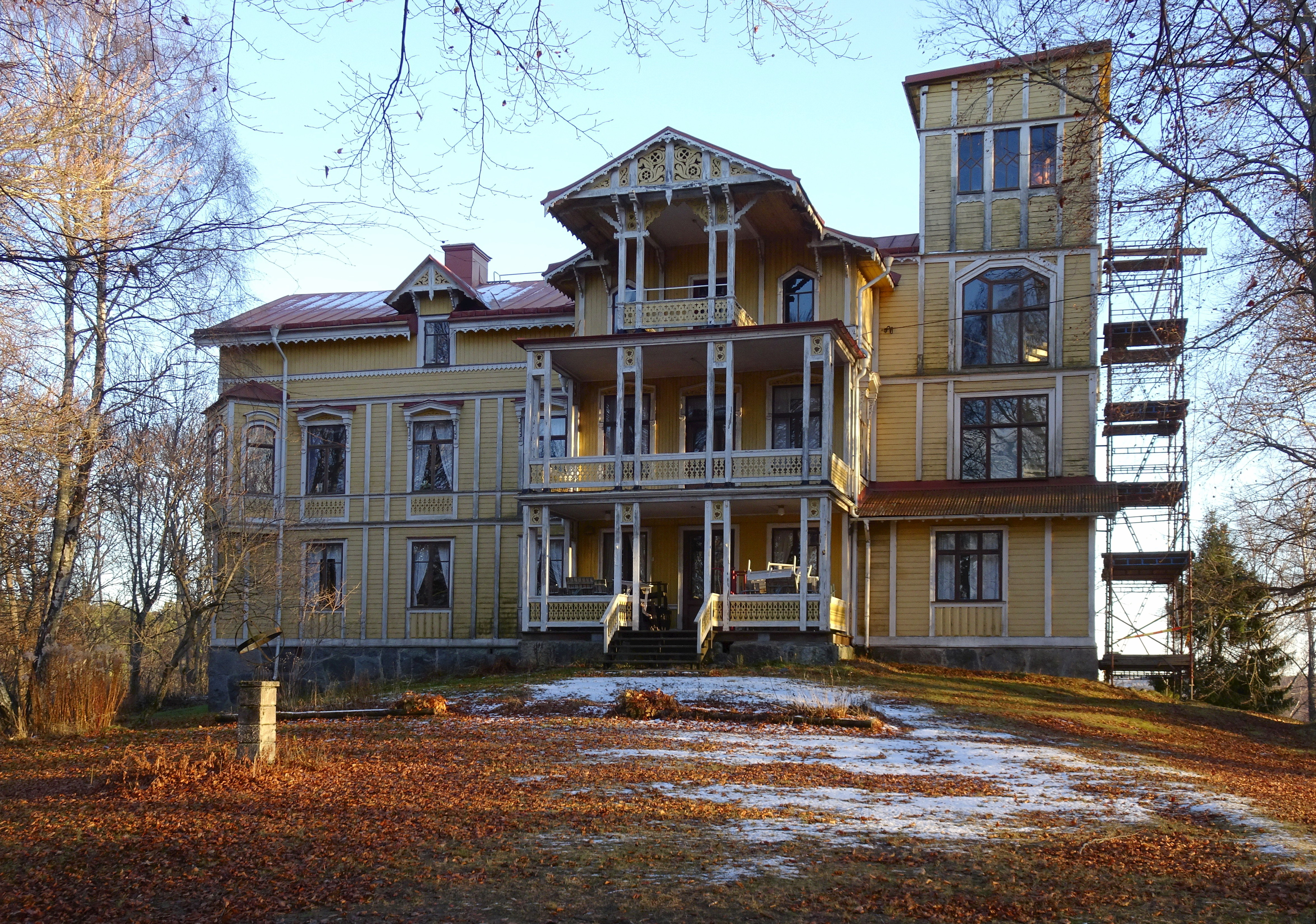 Sillvik vid Sturehov